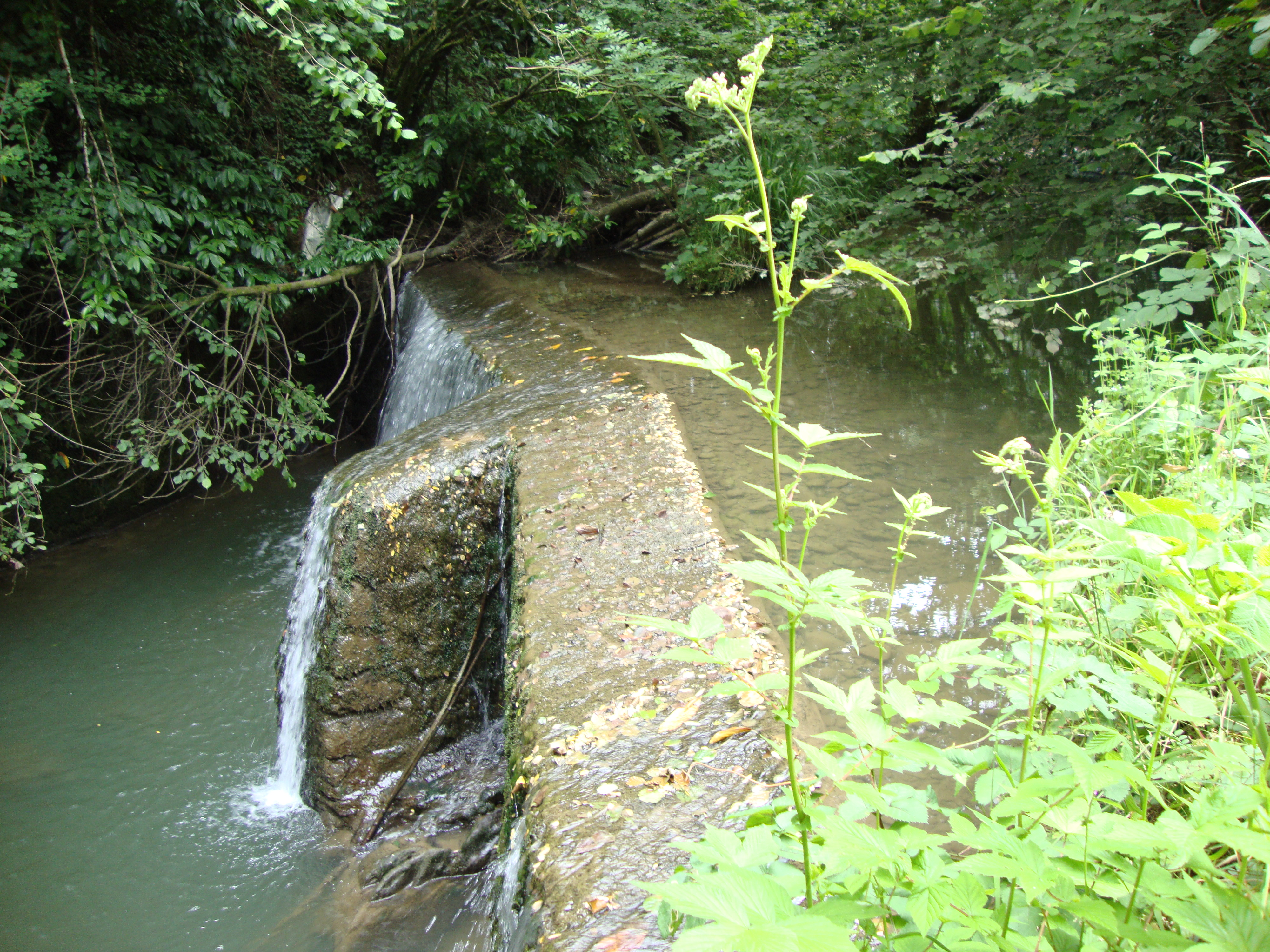 Issor (Pyr-Atl, Fr) le Laboo en contrebas du pont du D918